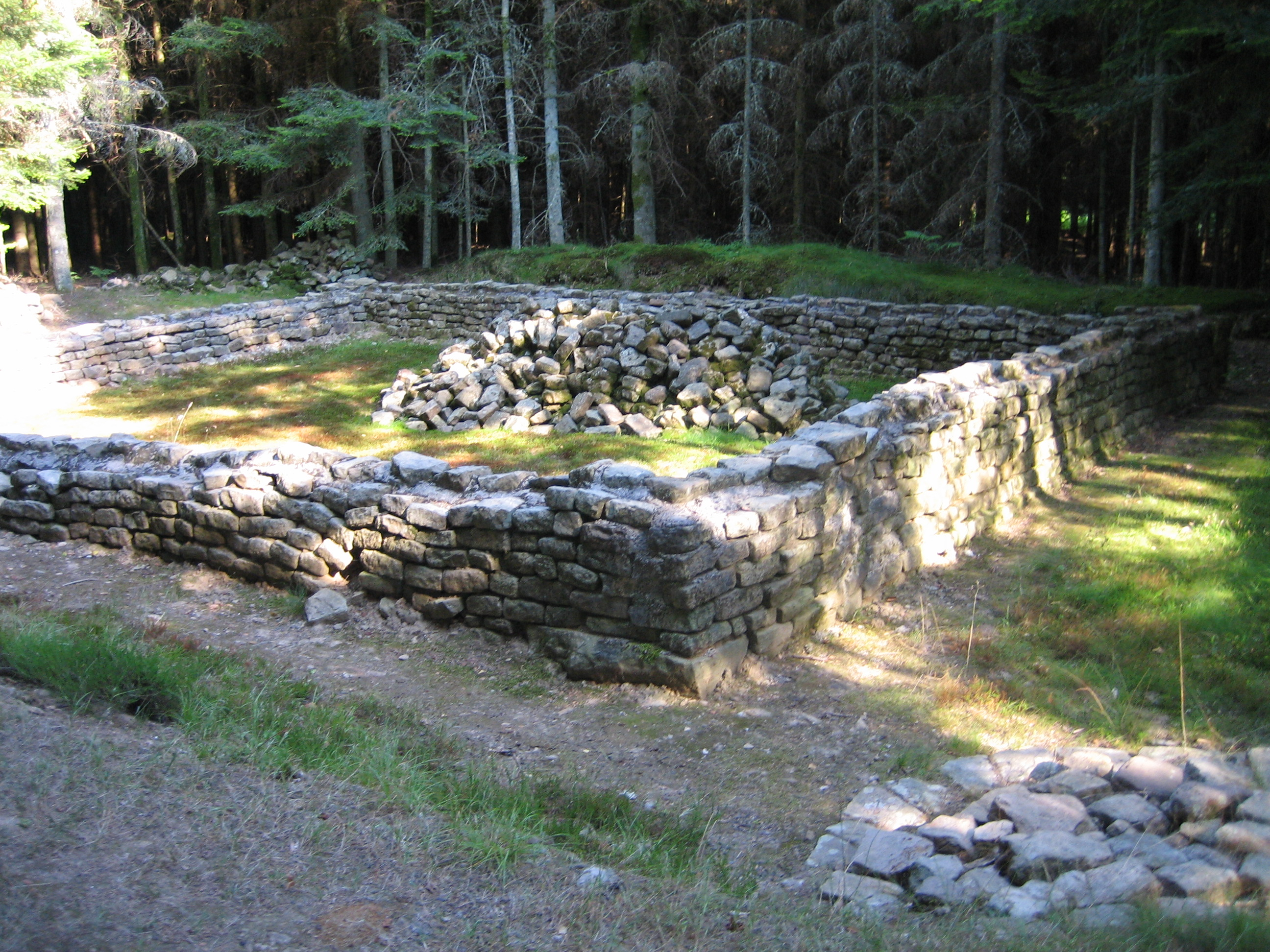 Sanctuaire gallo-romain de la forêt de Tannière (Vosges, France), by Raphaël Tassin (raphdvoj), 2006/07